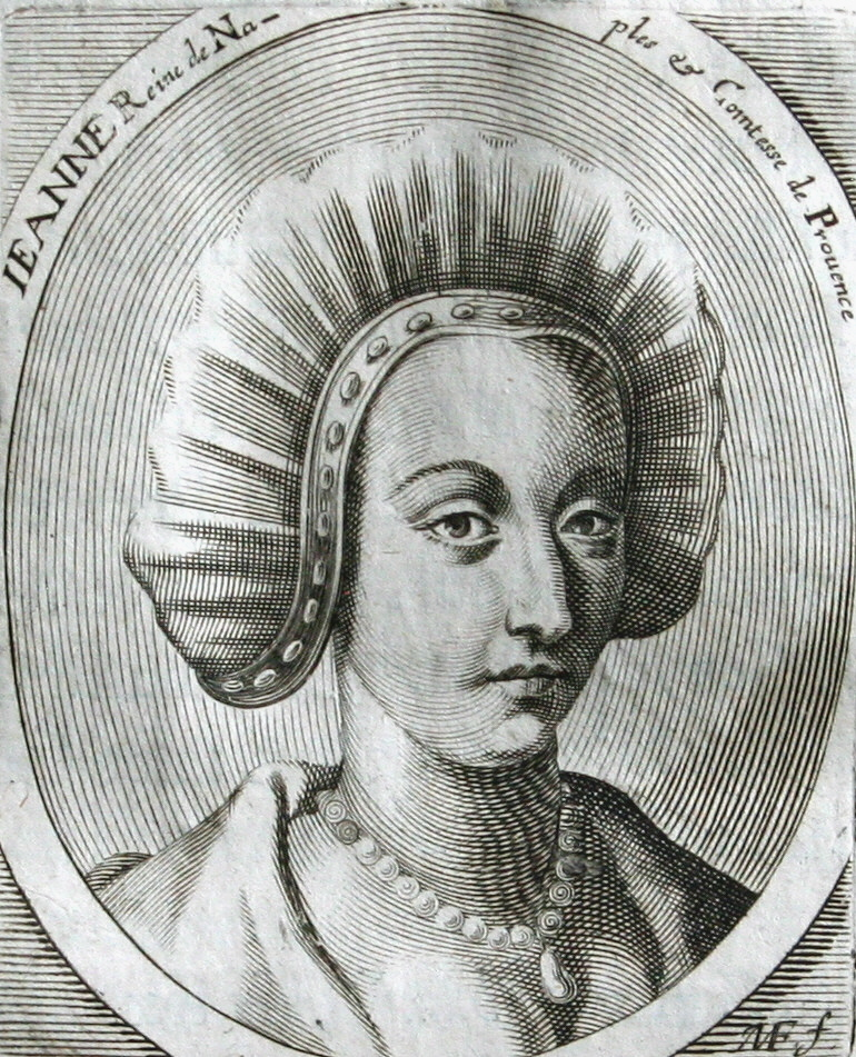 Reine Jeanne, comtesse de Provence, gravure de l'histoire de comtes de Provence par Antoine de Ruffi, 1655.